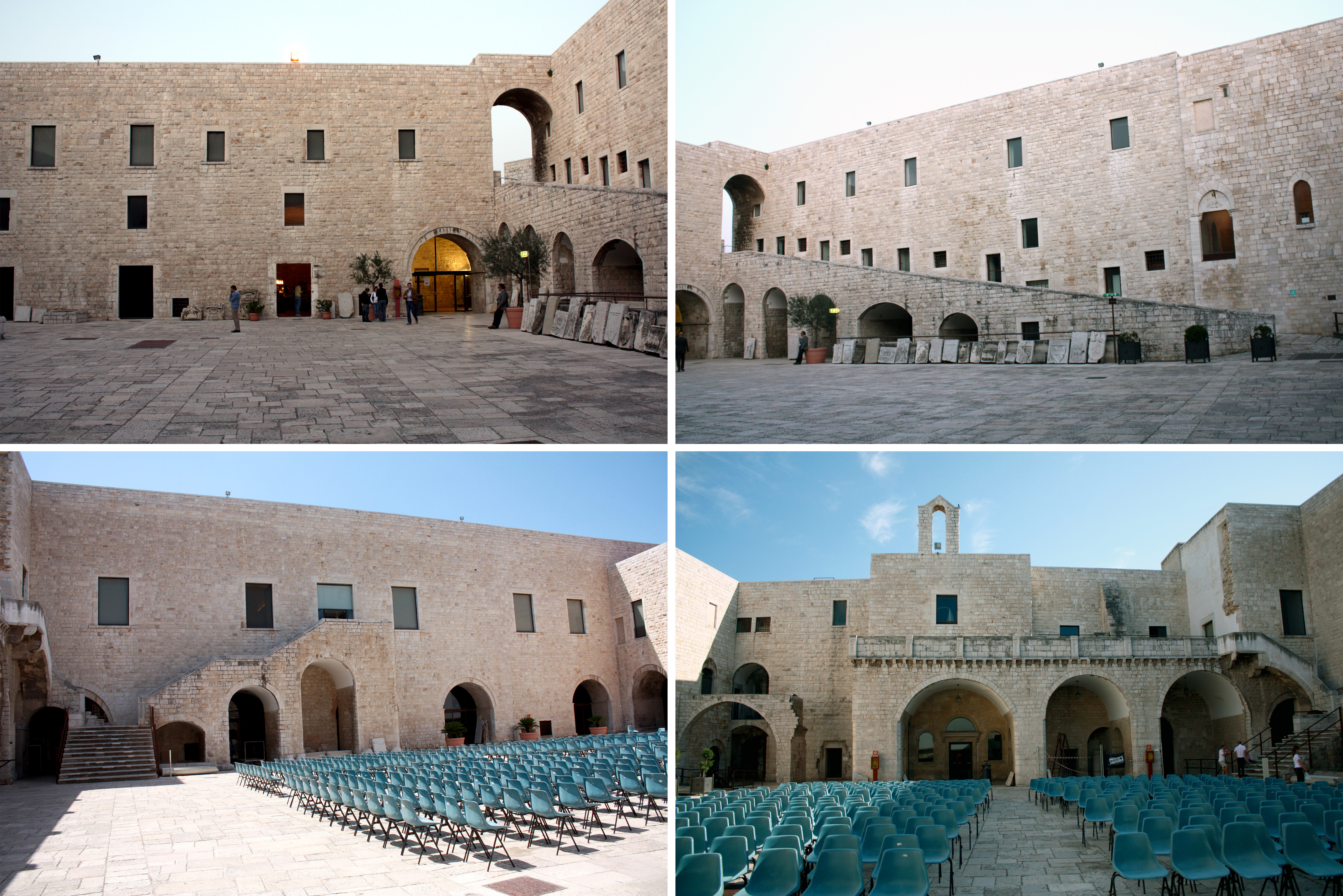 Castello di Barletta - Collage dei quattro prospetti interni visti dal cortile. Da in alto a sinistra in senso orario, i prospetti interni: nord, est, sud, ovest.